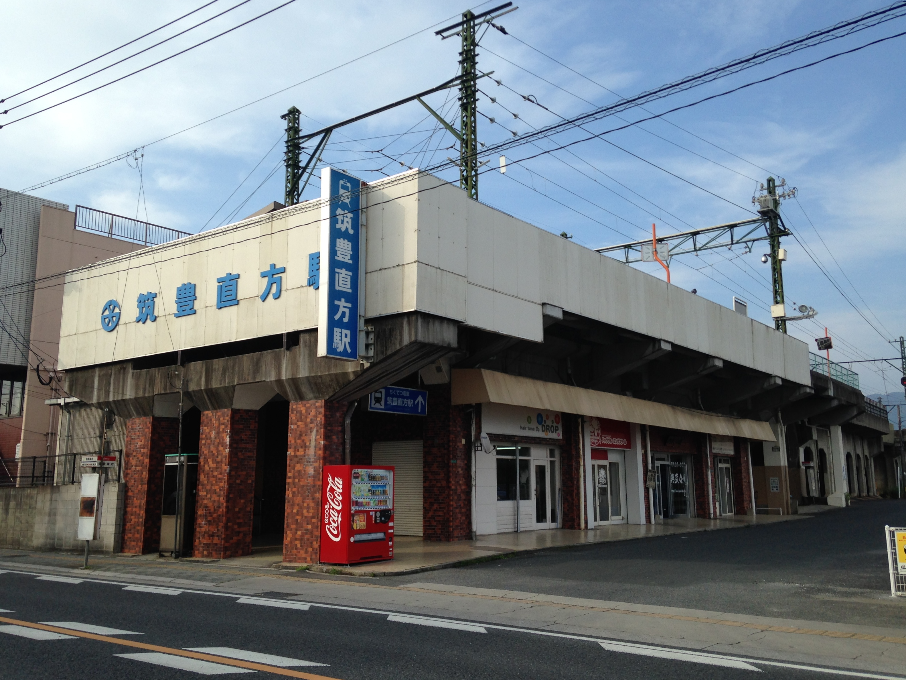 筑豊直方駅の駅舎